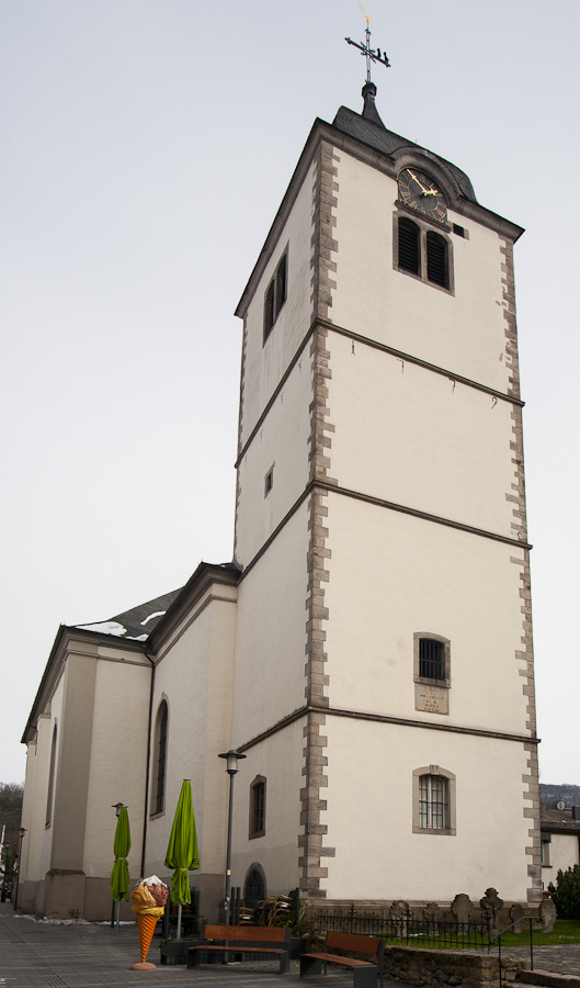 Kath. Pfarrkirche St. Remigius, Hauptstraße 410 (Ecke Drachenfelsstraße), Königswinter: Ansicht von der Drachenfelsstraße